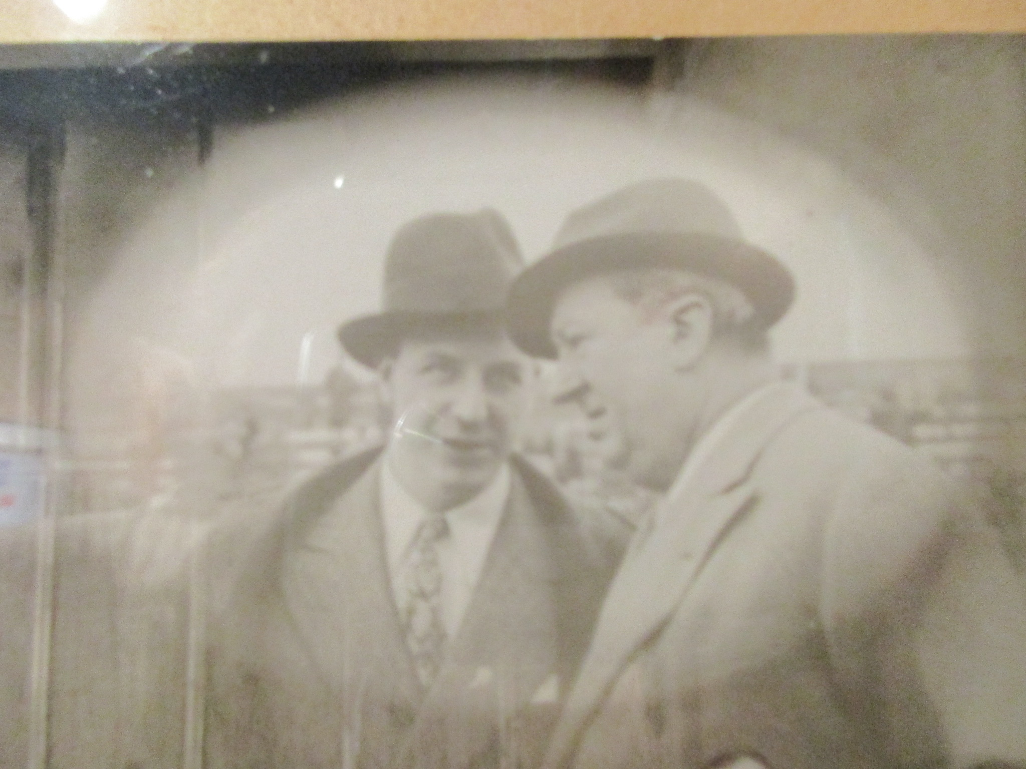 Ettore Bugatti et Jean Bugatti, sur la photo souvenir des 40 ans de Bugatti, avec les compagnons salariés de la première heures de l'Usine Bugatti de Molsheim 1910-1950. Photo du musée Bugatti de Molsheim